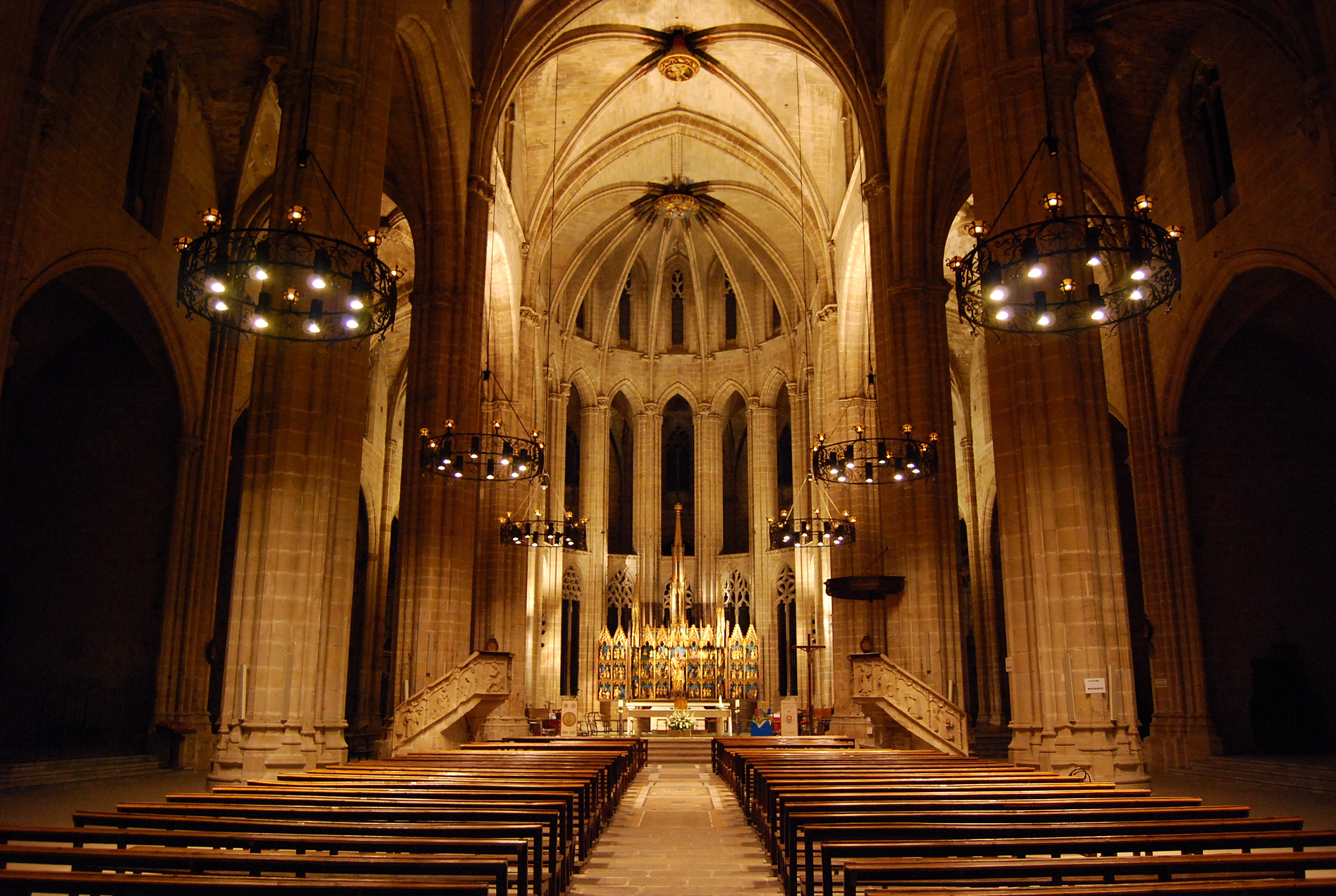 Catedral de Santa Maria (Tortosa)